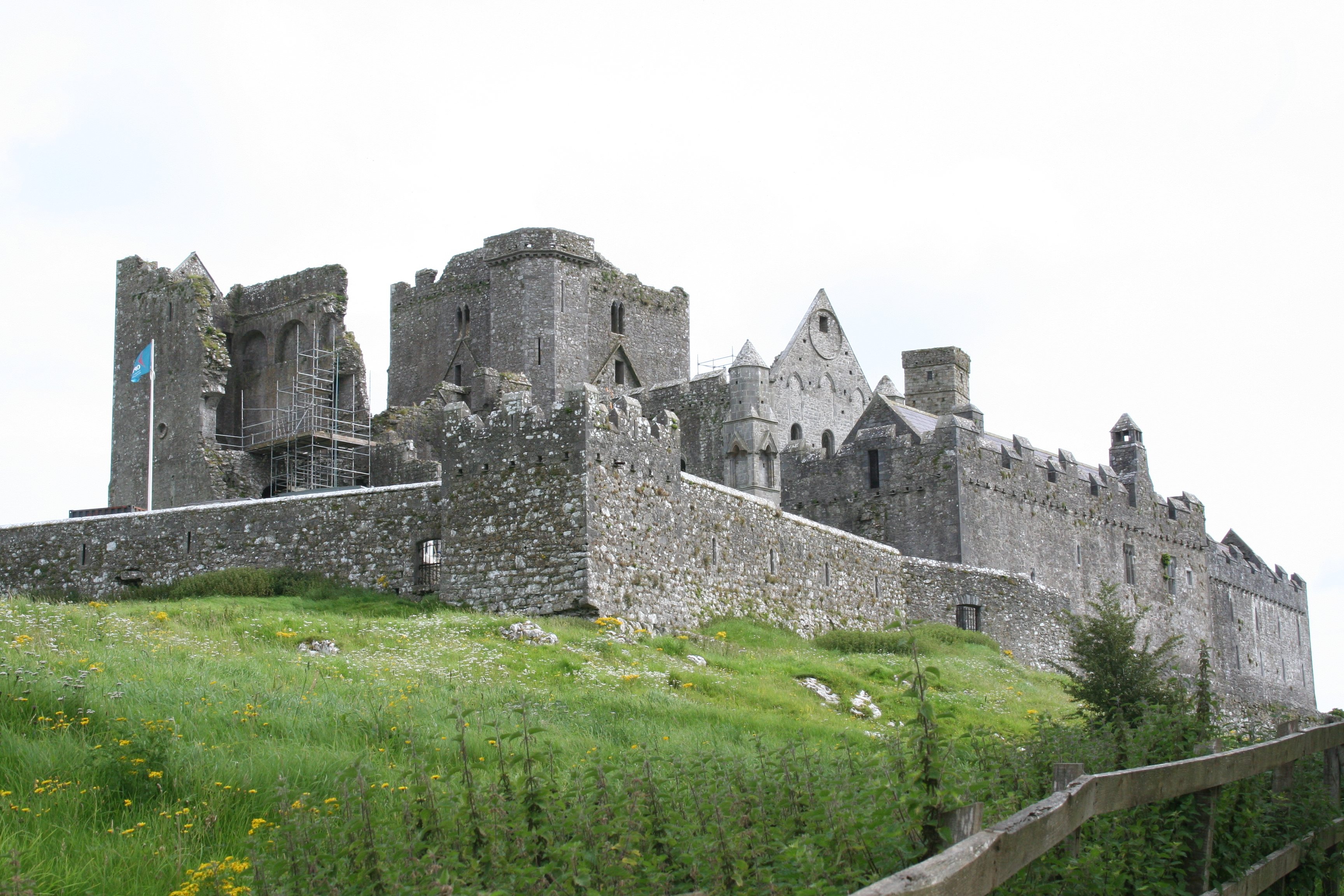 Rock of Cashel, ruinas de la catedral, condao de Tipperary